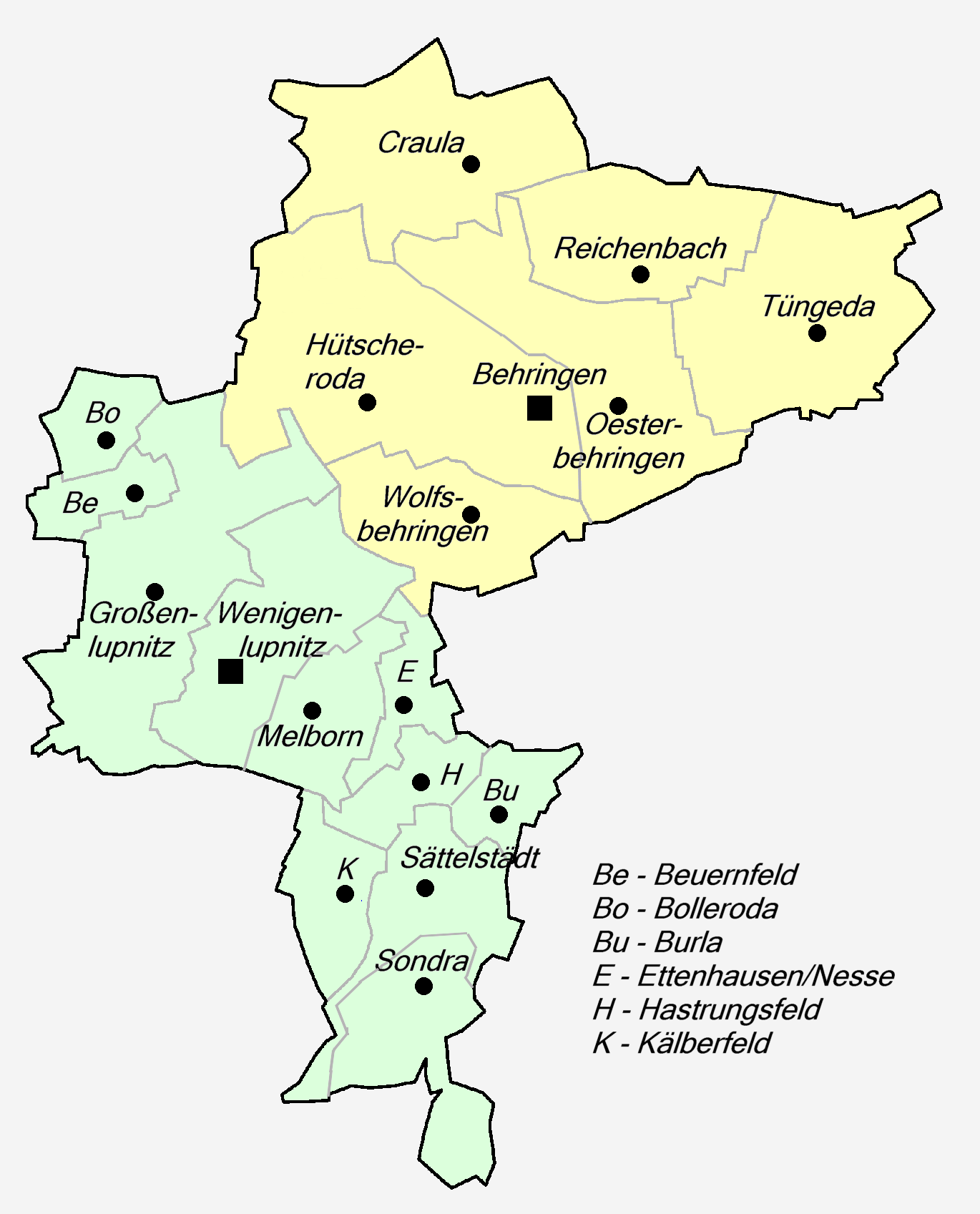 Kartensatz zur Gemeindeentwicklung